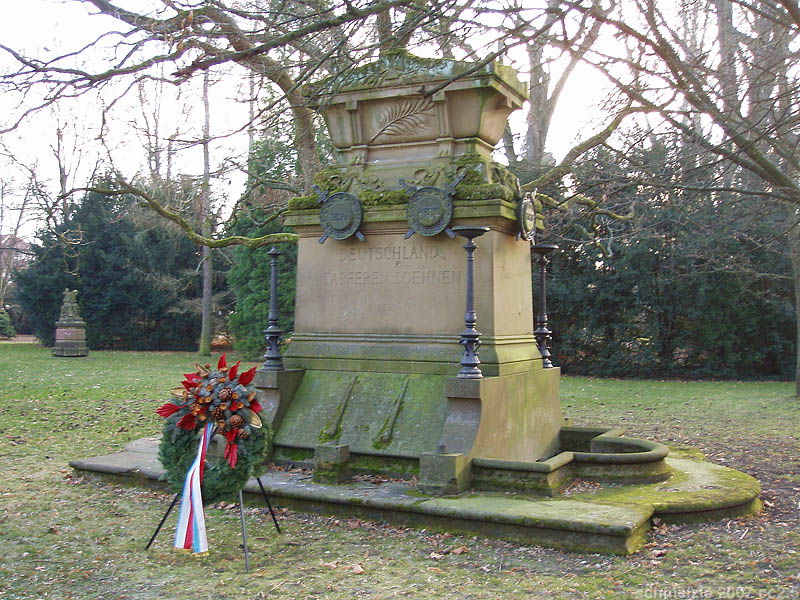 Kriegerdenkmal 1870/71 im Alten Friedhof in Heilbronn